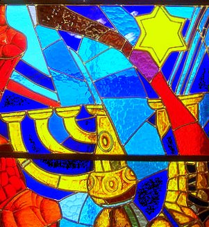 Синагога на Подолі вул. Щекавицька, 29 в Киеве